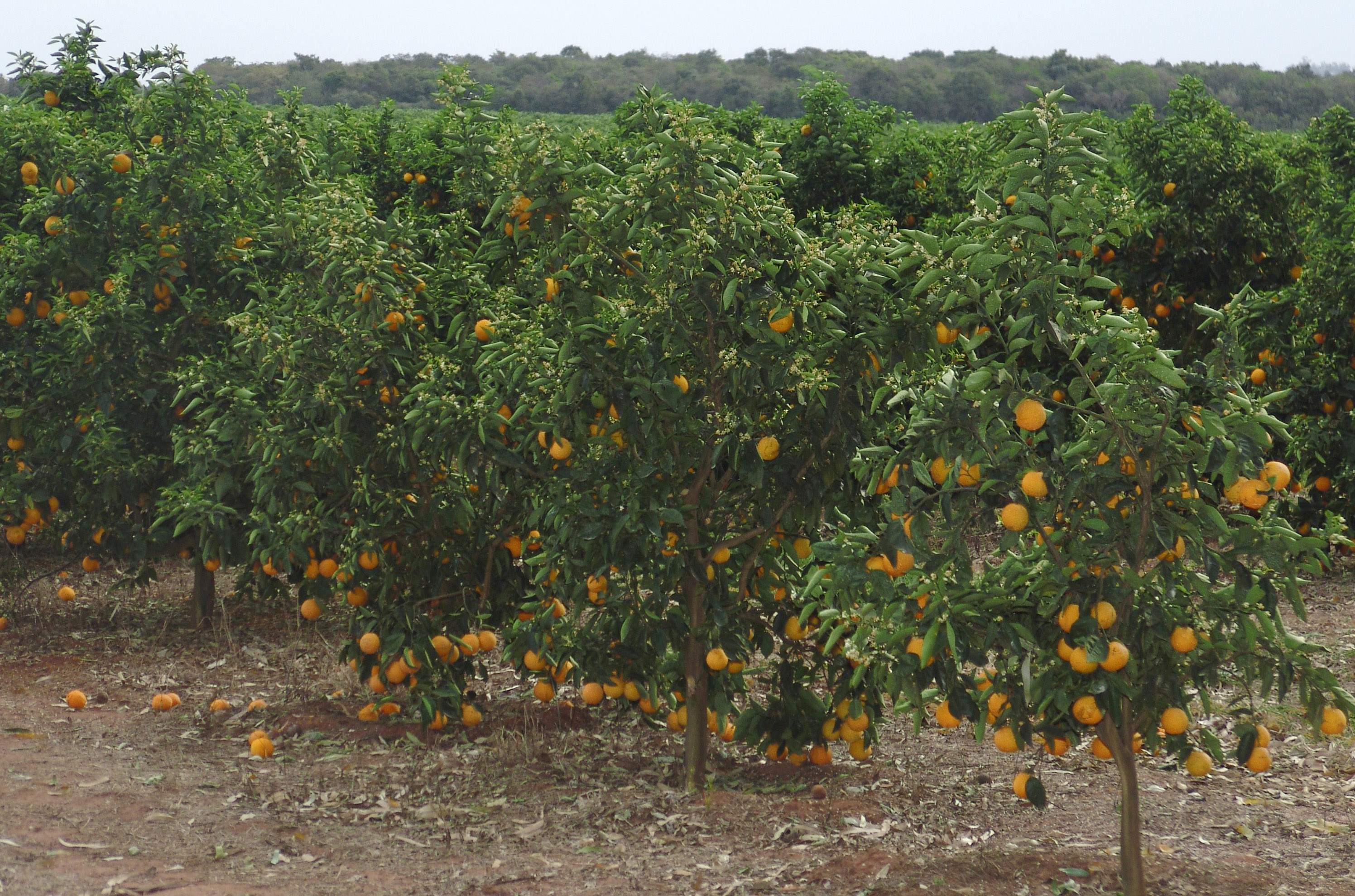 Laranjal